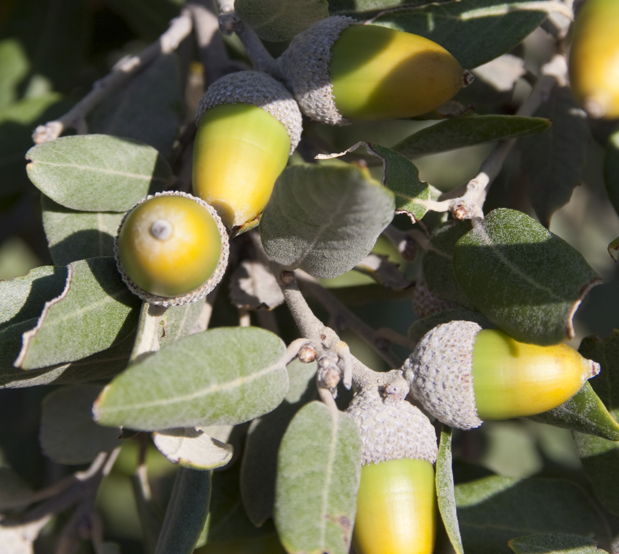 Quercus rotundifolia acorns, Cannosa, Dubrovačko-neretvanska, Croatia.